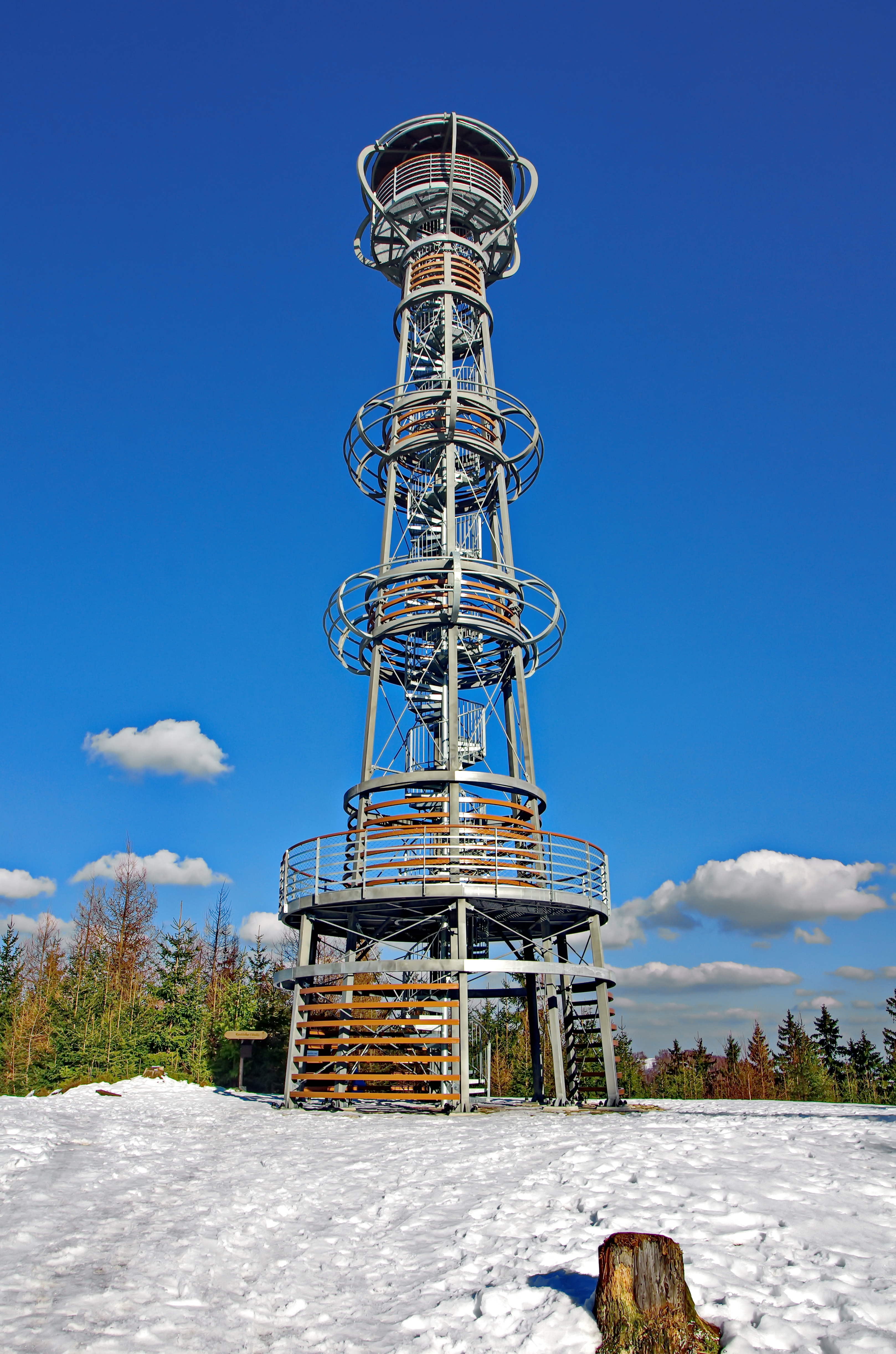 rozhledna Cibulka nad Olovím, okres Sokolov